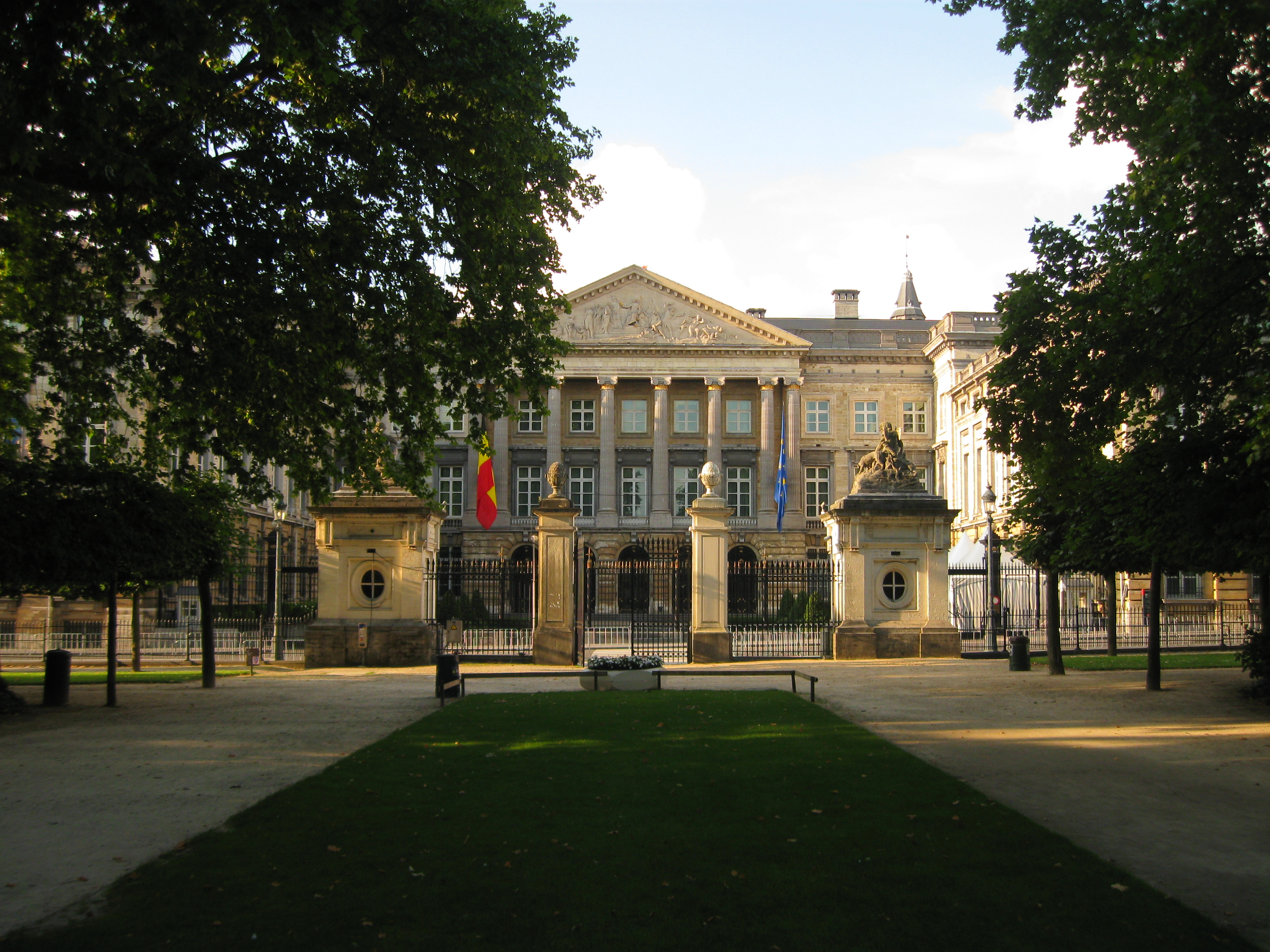 BELGIË - Paleis der Natie, zetel van het Federaal Parlement van België bestaat uit de Kamer van Volksvertegenwoordigers en de Senaat.